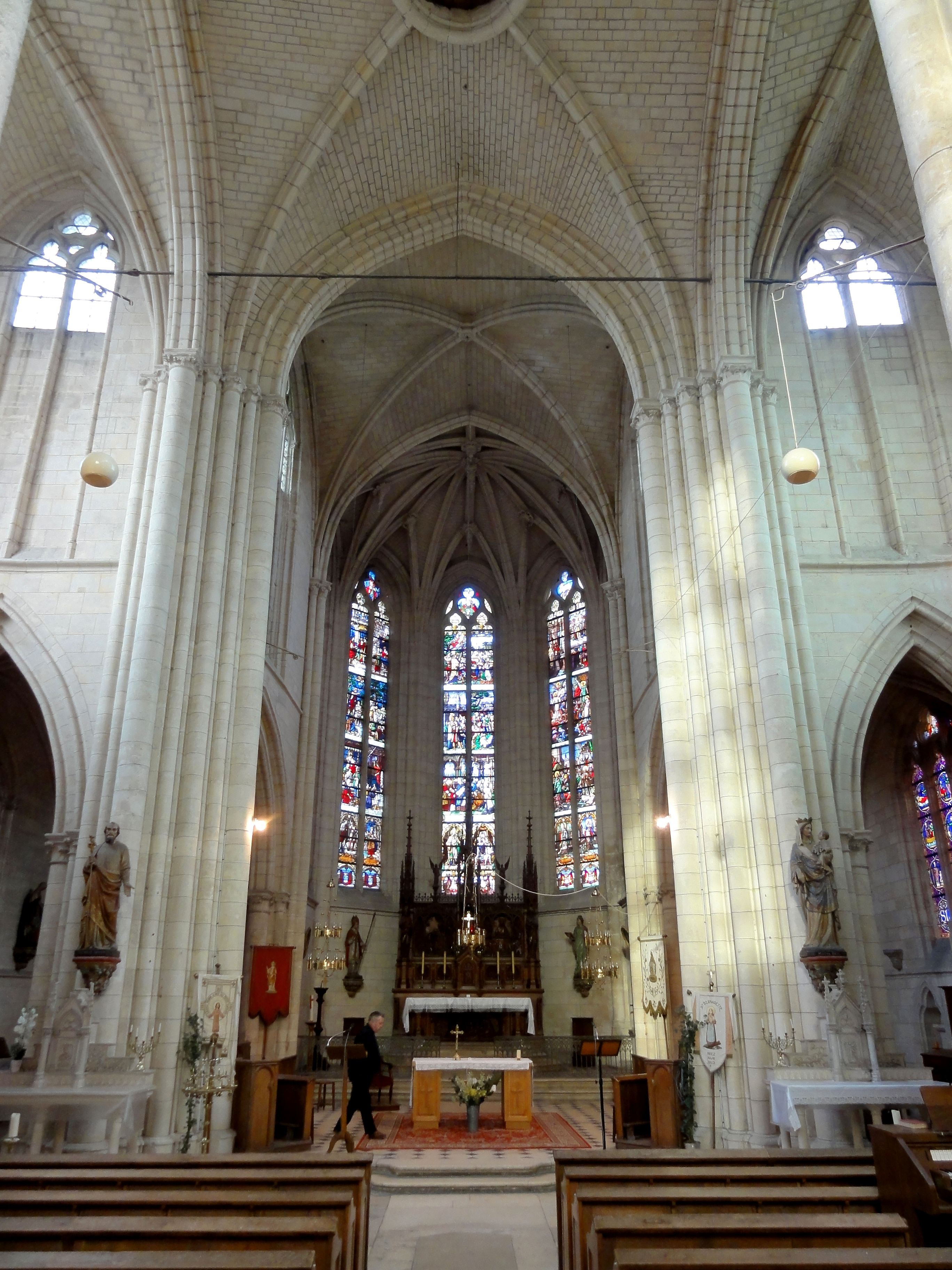 Croisée du transept, vue vers l'est.